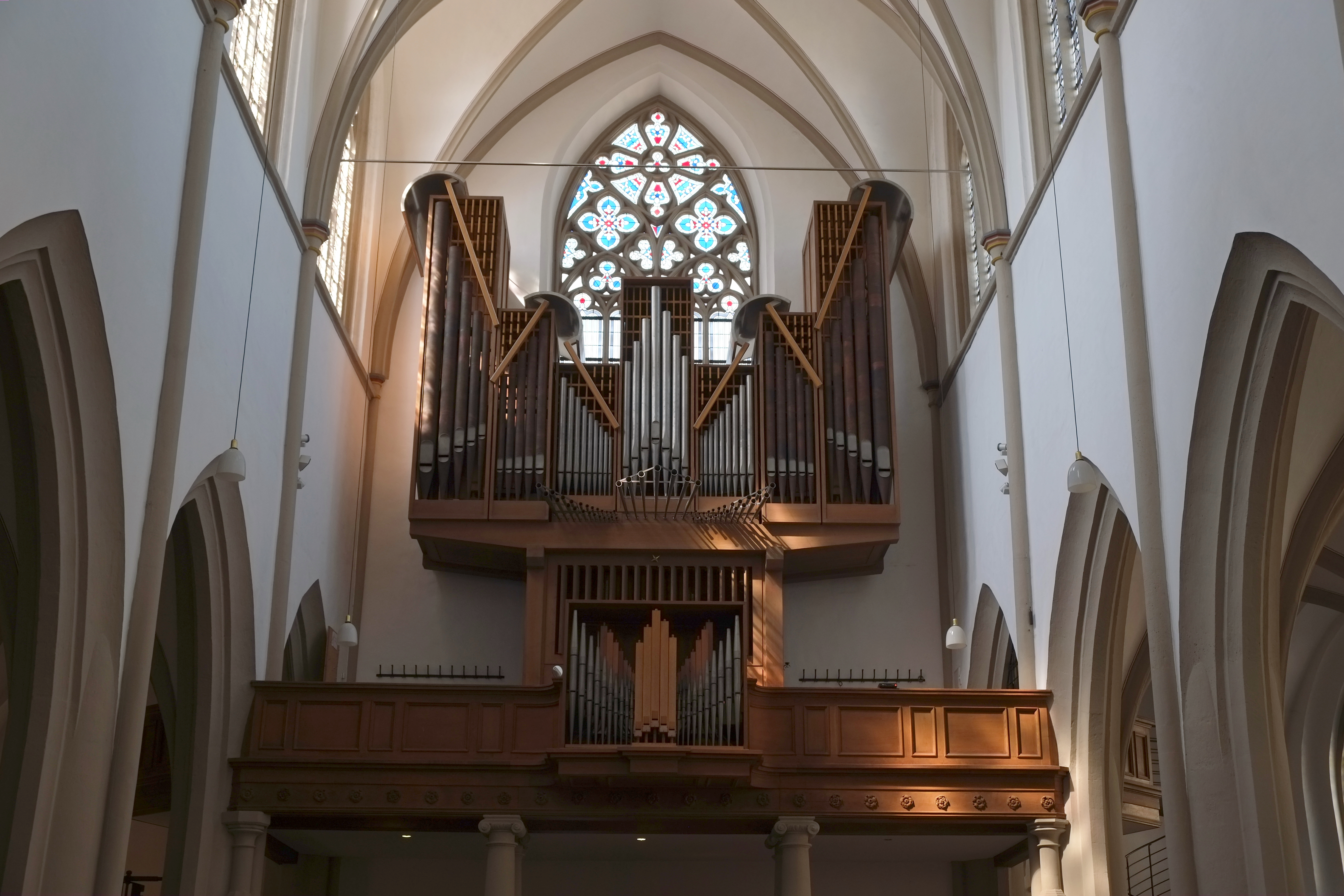 Kirche St. Remigius in Bonn (Deutschland)